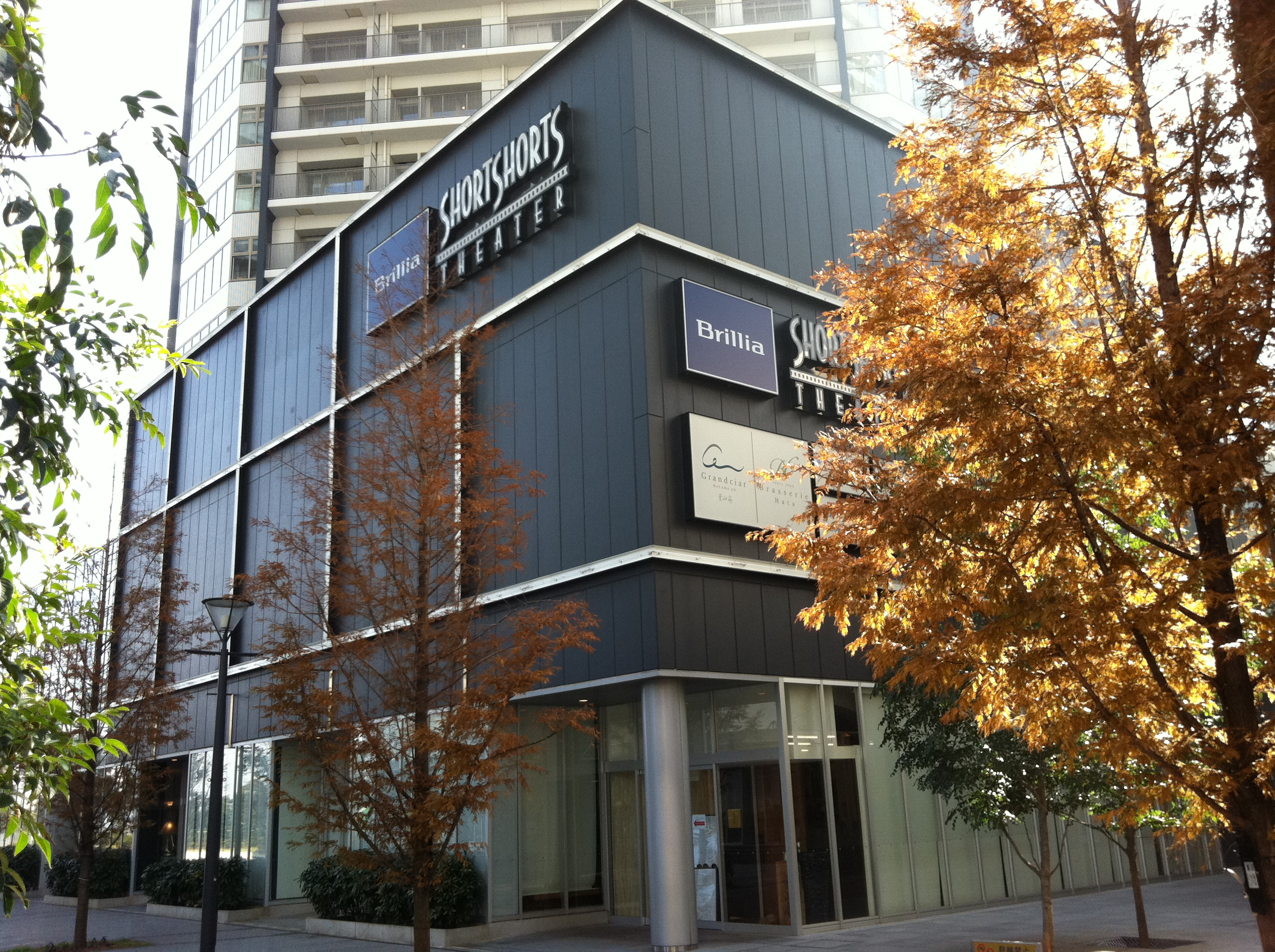 Brillia Grande みなとみらいの下層部商業施設、ブリリア・ショートショートシアターなどが入る「Filmee」（フィルミー）の外観。キング軸沿いにある。